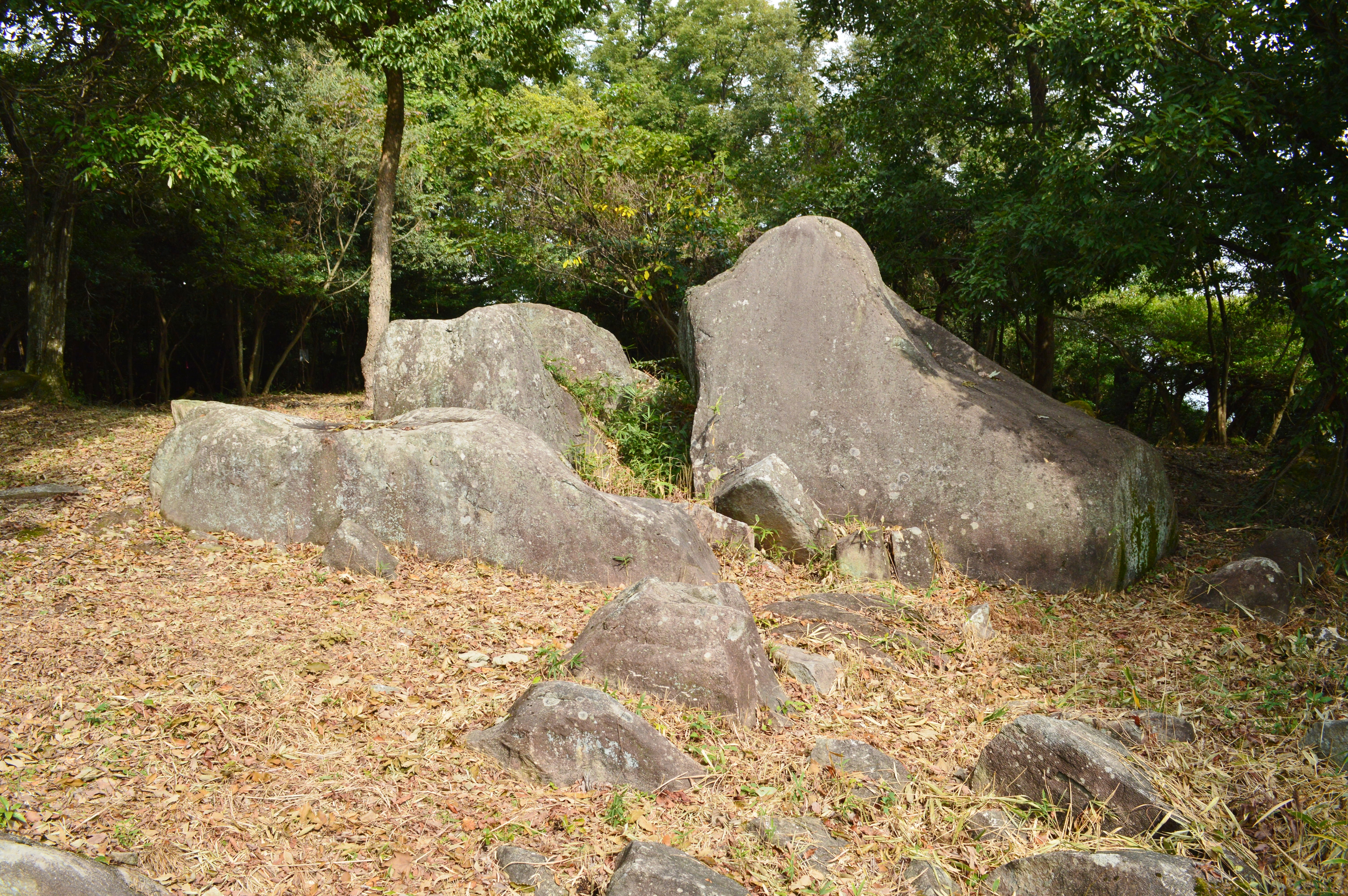 城山山上の明神原遺跡